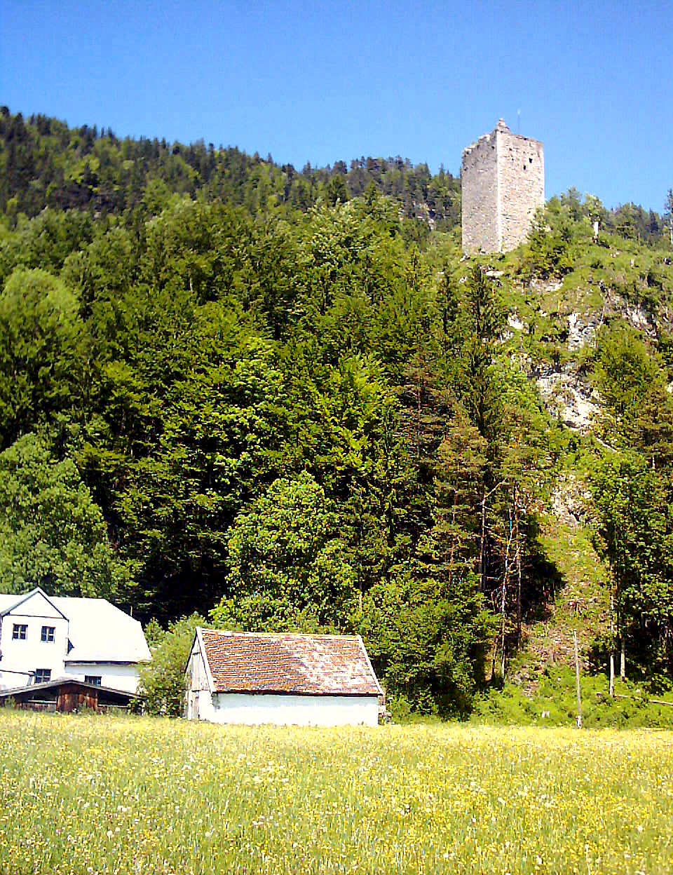 Der Burgfelsen mit dem Bergfried